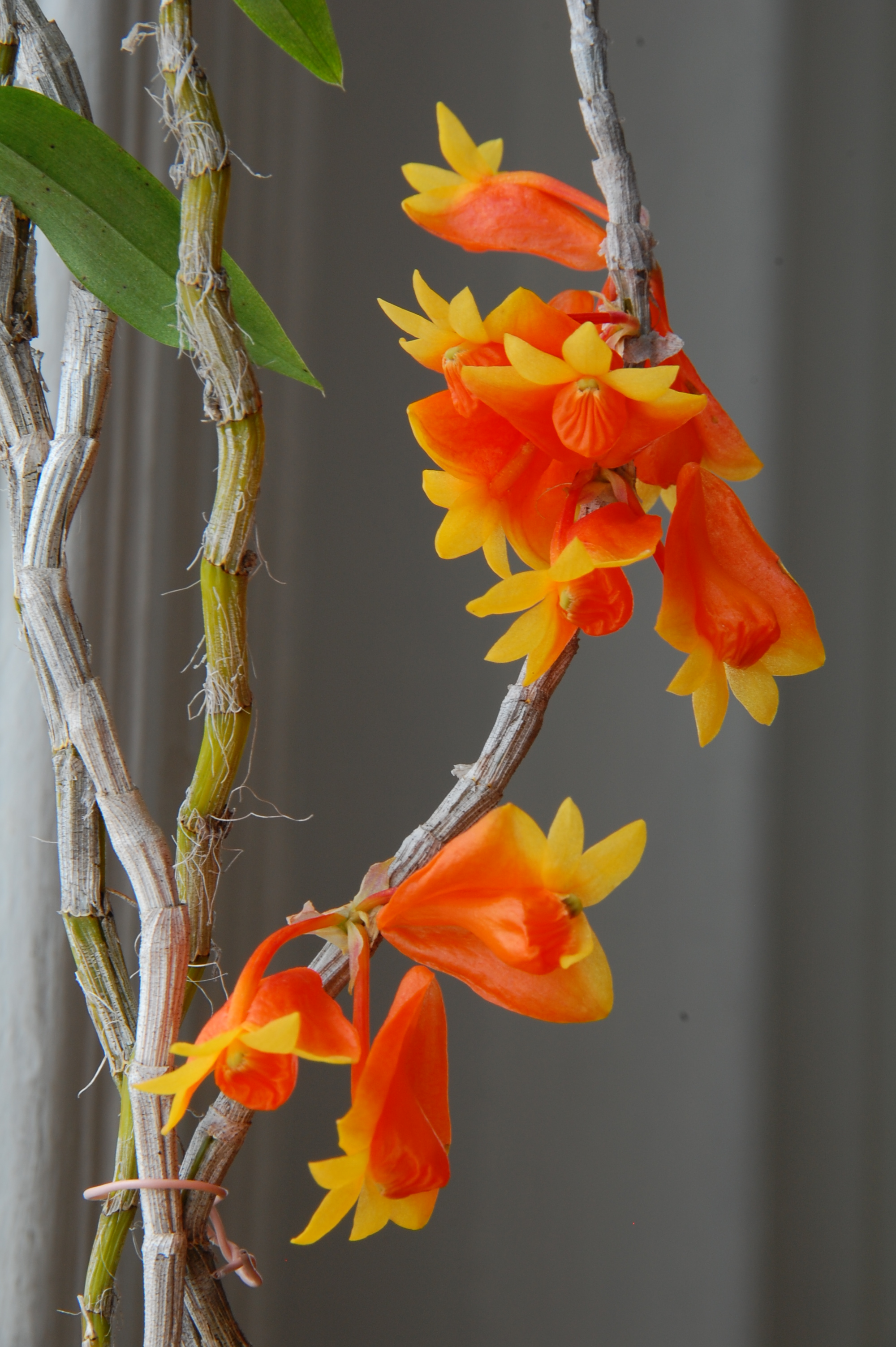 Dendrobium wentianum, syn. Dendrobium obtusipetalum